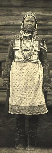 Замужняя женщина в свадебном костюме свахи. Чуваши верховые. Марий Эл, Козьмодемьянский р-он (Казанская губ., Козьмодемьянский уезд). Начало XX века.